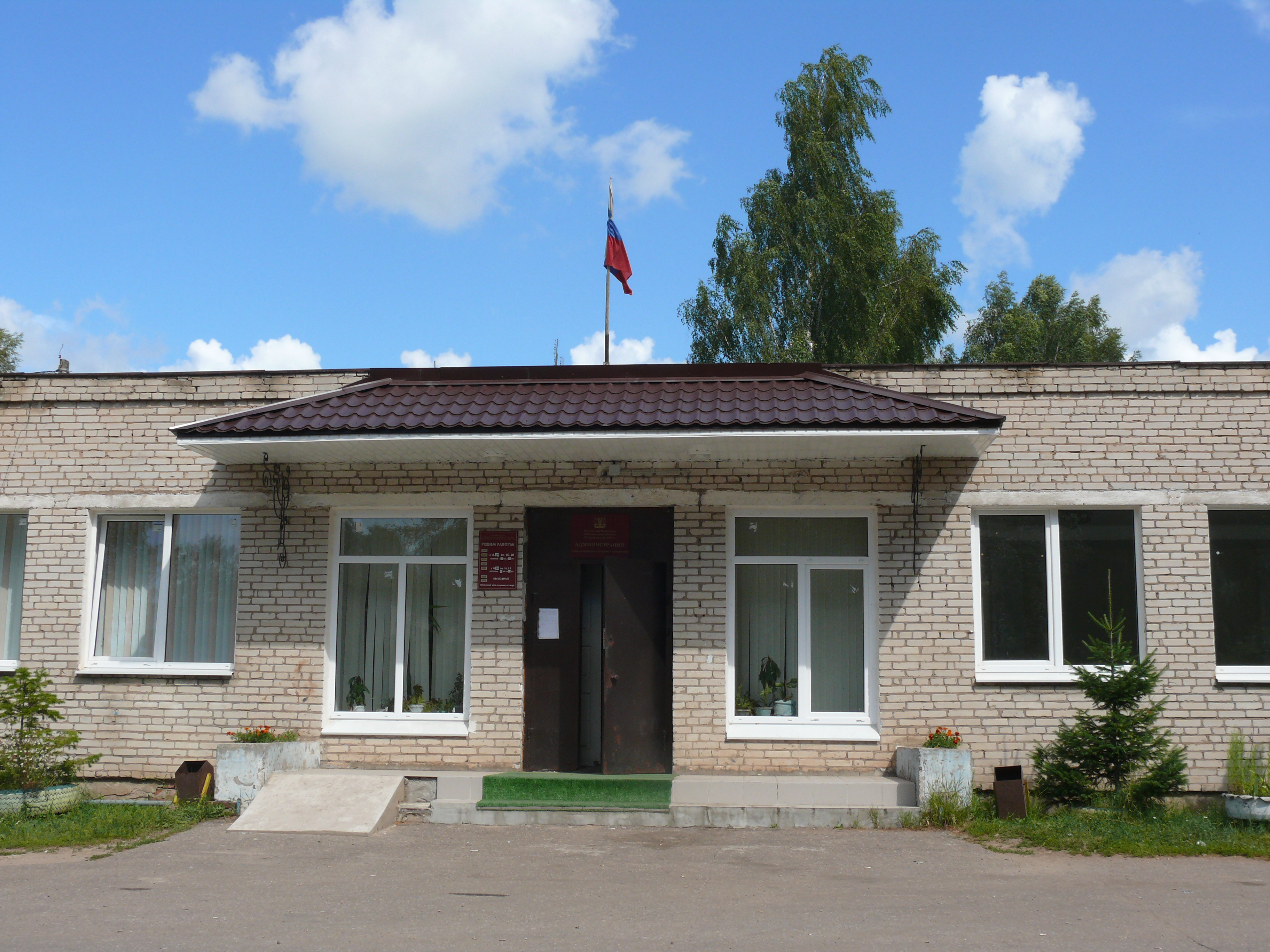 Администрация Новоселицкого сельского поселения. Новгородскйи район Новгородской области